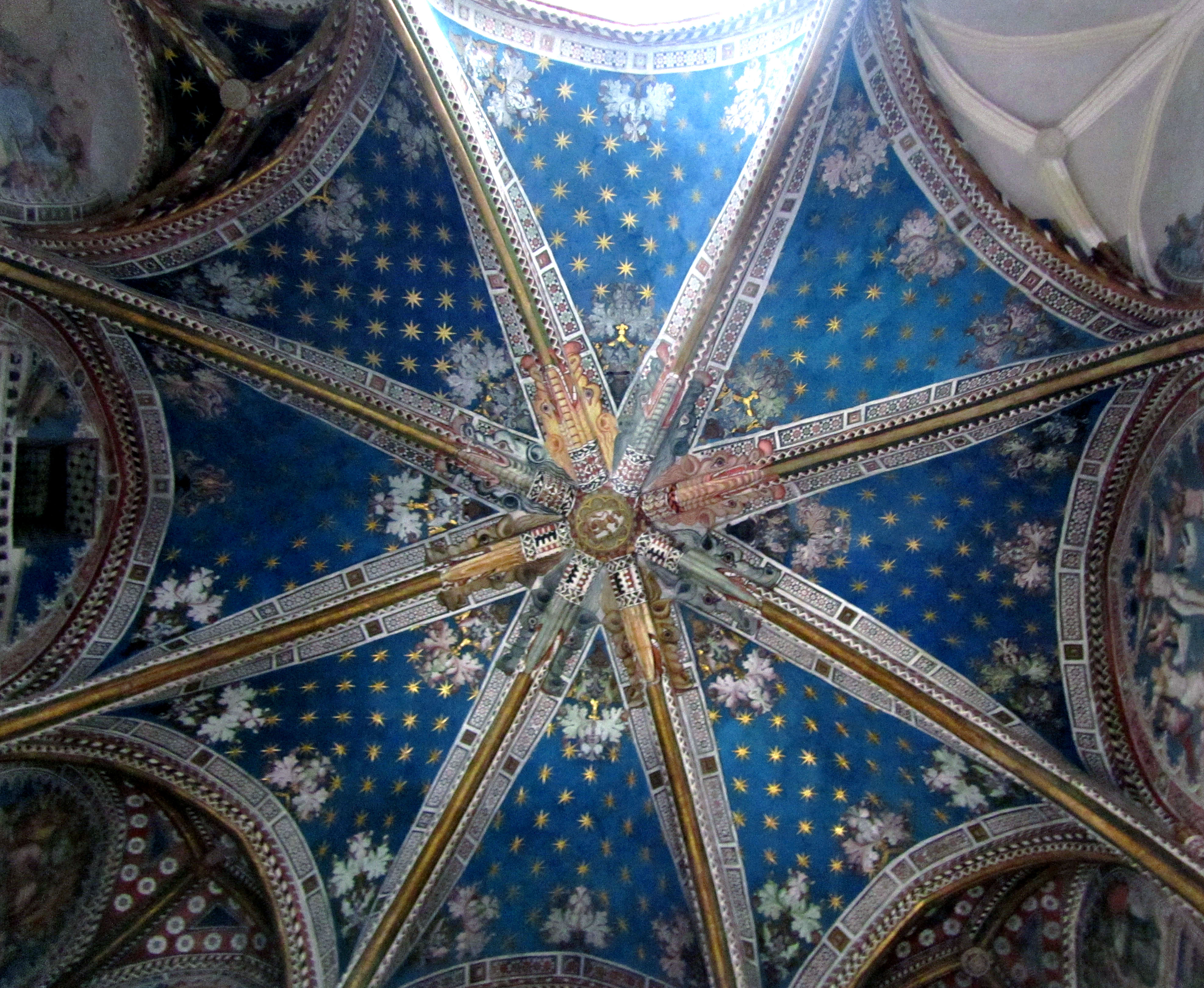 Cúpula de la capilla de San Blas en la catedral de Toledo (Spain)